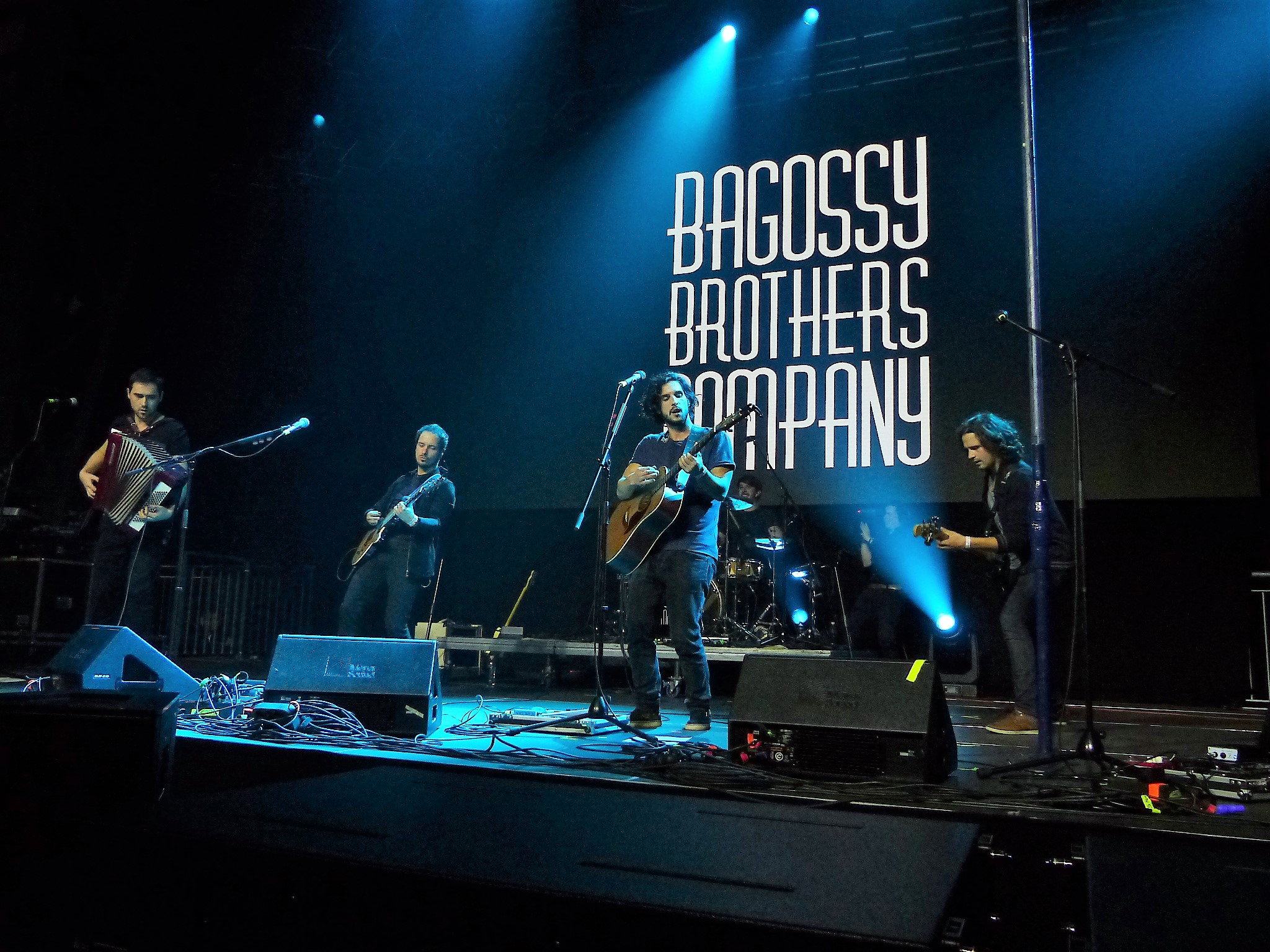 Bagossy Brothers Company (BBC), A felvétel a Szabadságkoncerten készült a Millenáris B épületében, 2017. október 23-án. Bagossy Norbert (gitár/ének) és Bagossy László (basszusgitár/vokál), Bartis Szilárd (dobok), Tatár Attila (gitárok, vokál) és Kozma Zsombor (hegedű, harmónika, billentyűk).